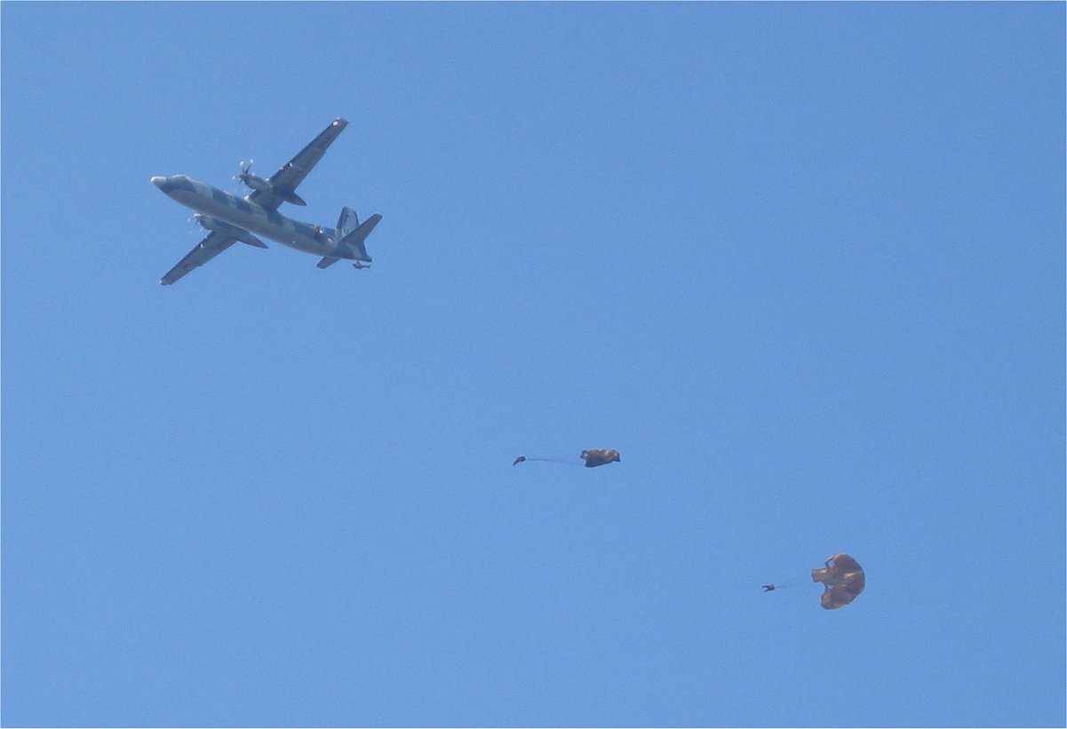 Fokker 60 vliegtuig tijdens de dropping op de Ginkelse Heide op 16 september 2006 Picture taken by myself